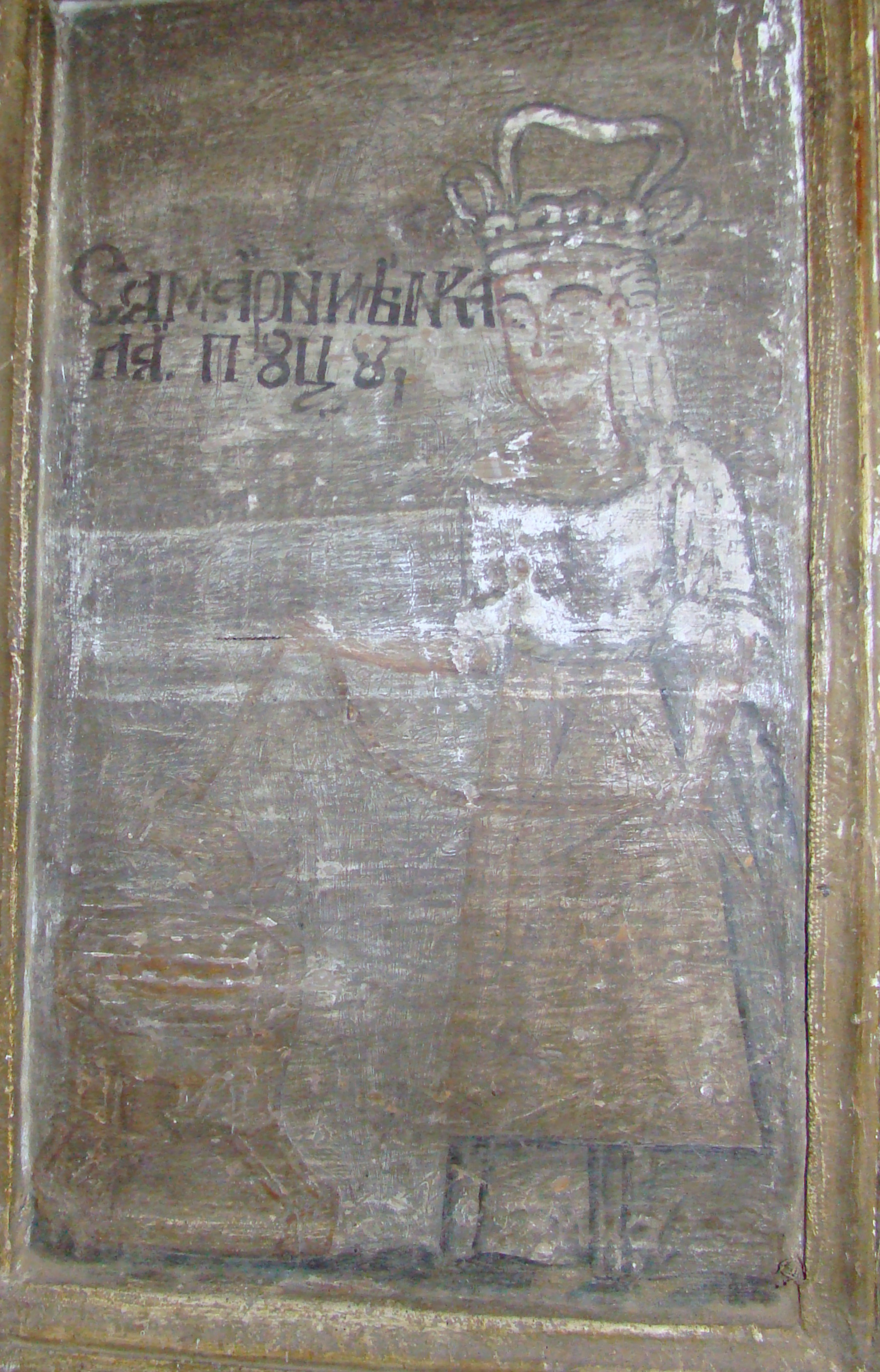 Biserica de lemn "Sfinții Arhangheli Mihail şi Gavriil" din Chieșd, județul Sălaj